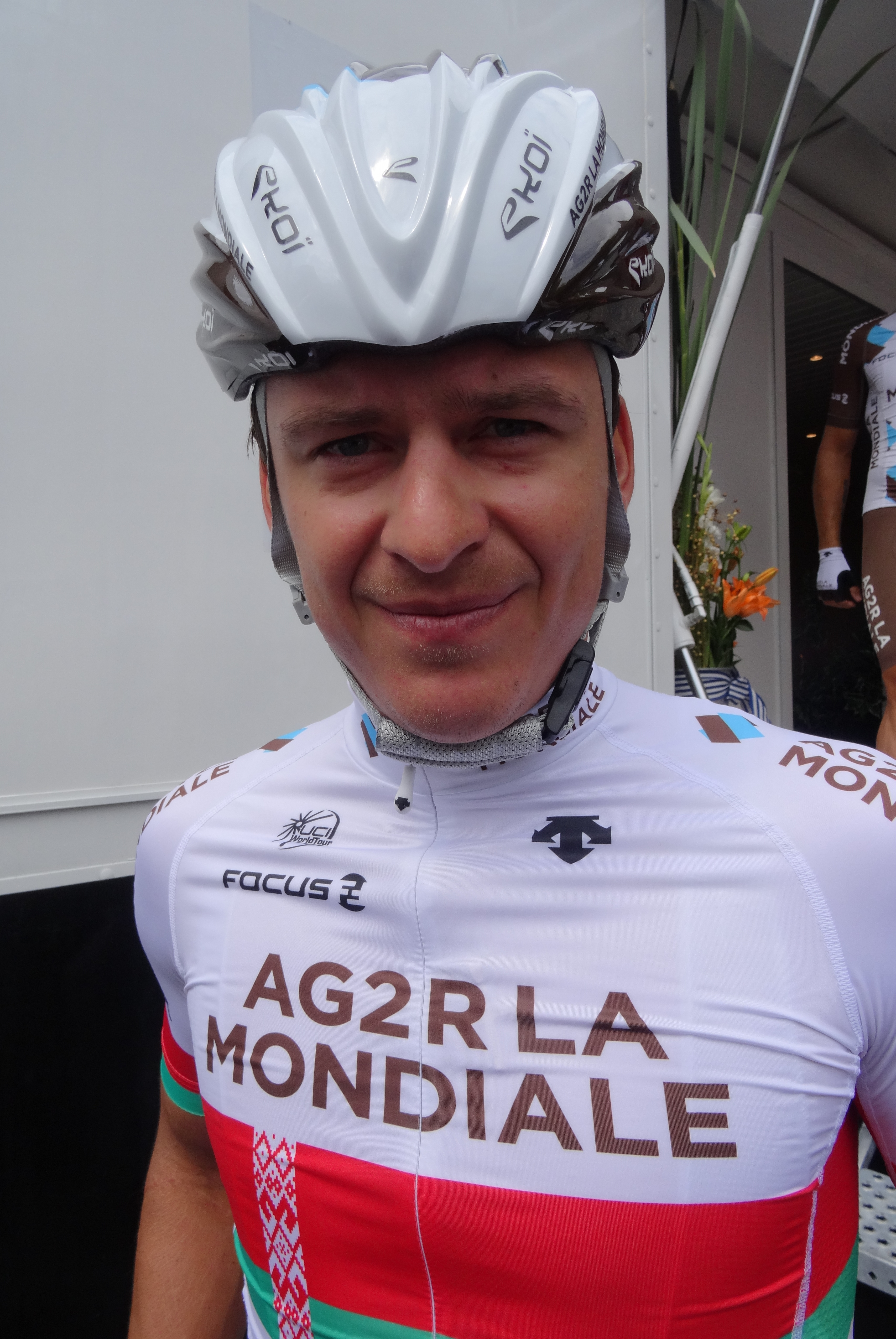 Reportage photographique réalisé le samedi 26 juillet à l'occasion du départ de la première étape du Tour de Wallonie 2014 à Frasnes-lez-Anvaing, Belgique.